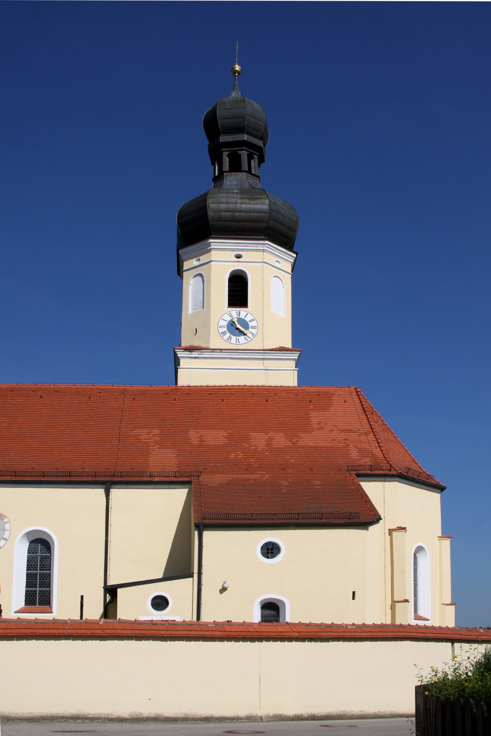 Anlage gotisch, nach Brand 1704 erneuert; mit Ausstattung. - Ehem. Seelenkapelle, jetzt Leichenhaus, barocker Bau mit Satteldach; an der Friedhofsummauerung.This is a photograph of an architectural monument.